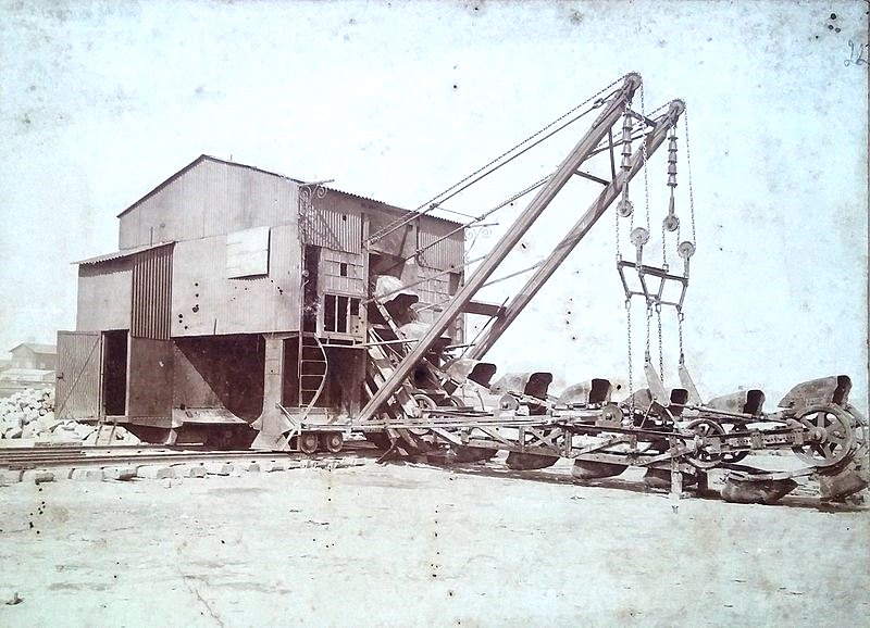 Снимки на членове на техническия състав на БАД за направа на Варненското пристанище, на работници, обекти, машини и съоръжения по време на строителните работи.